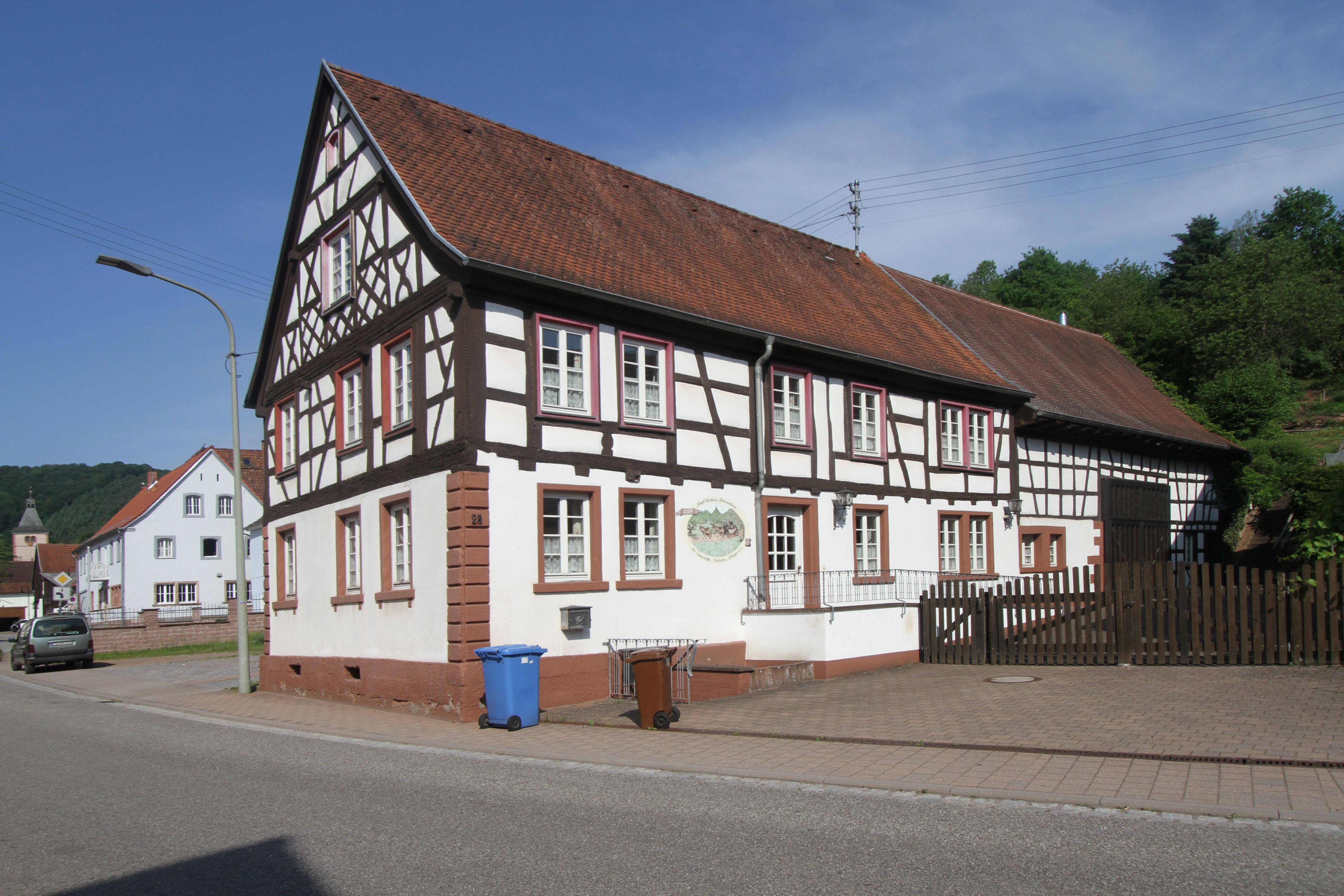 Denkmalgeschütztes Haus in Rumbach.